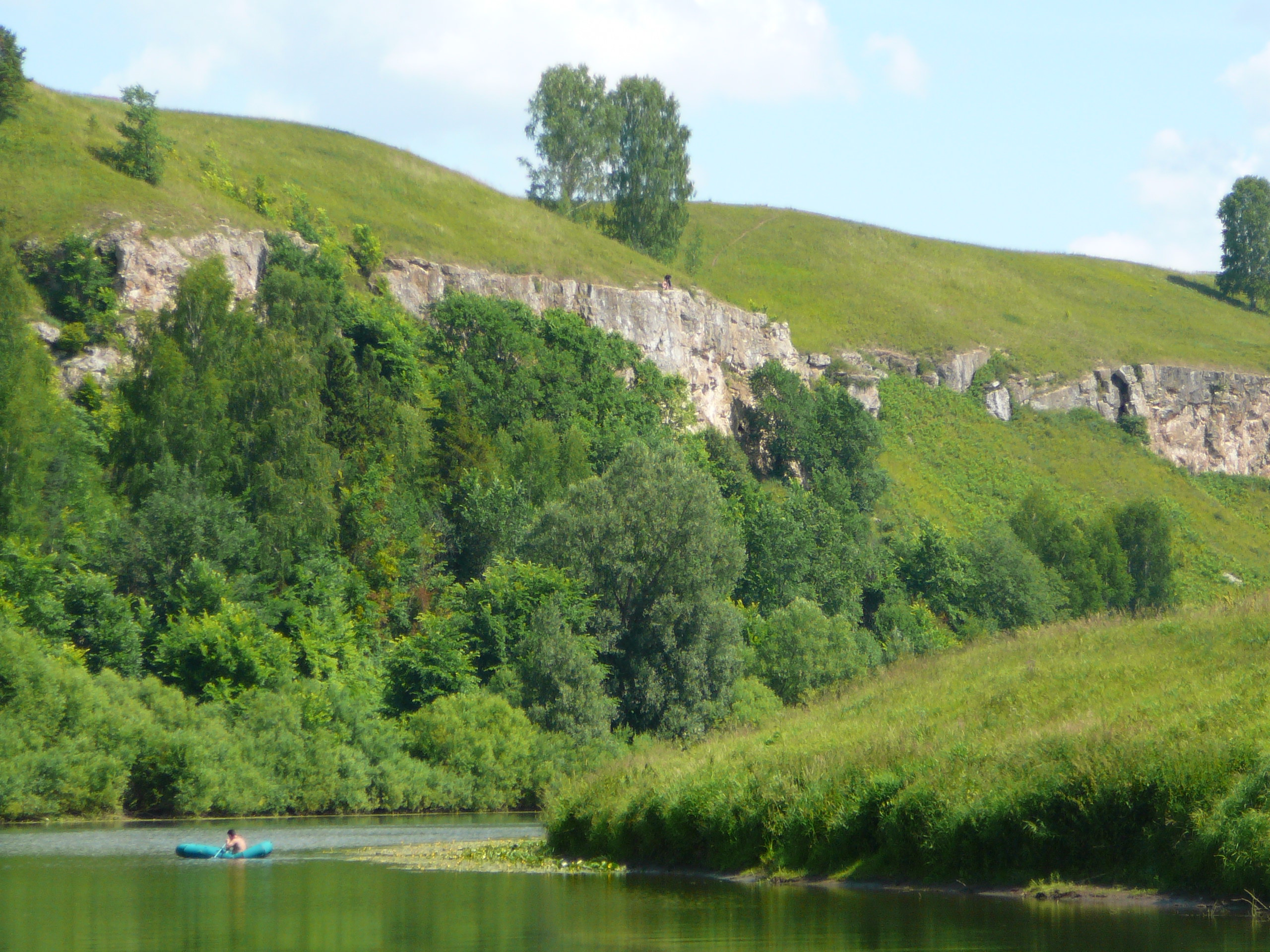 Скалы